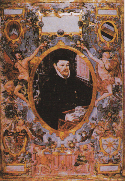 Albrecht Černohorský z Boskovic. Zemské desky olomoucké